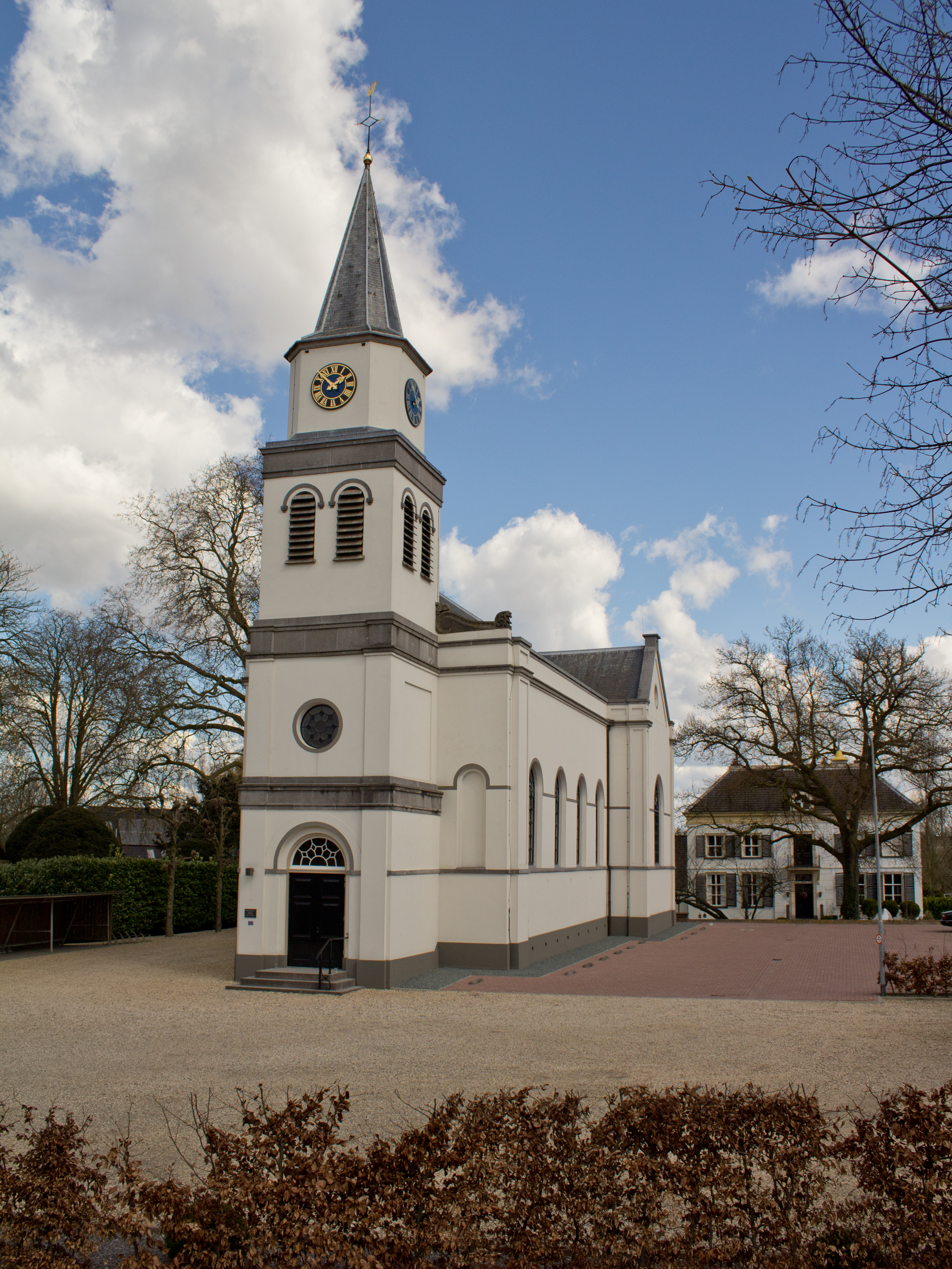 Waardenburg, Hervormde kerk